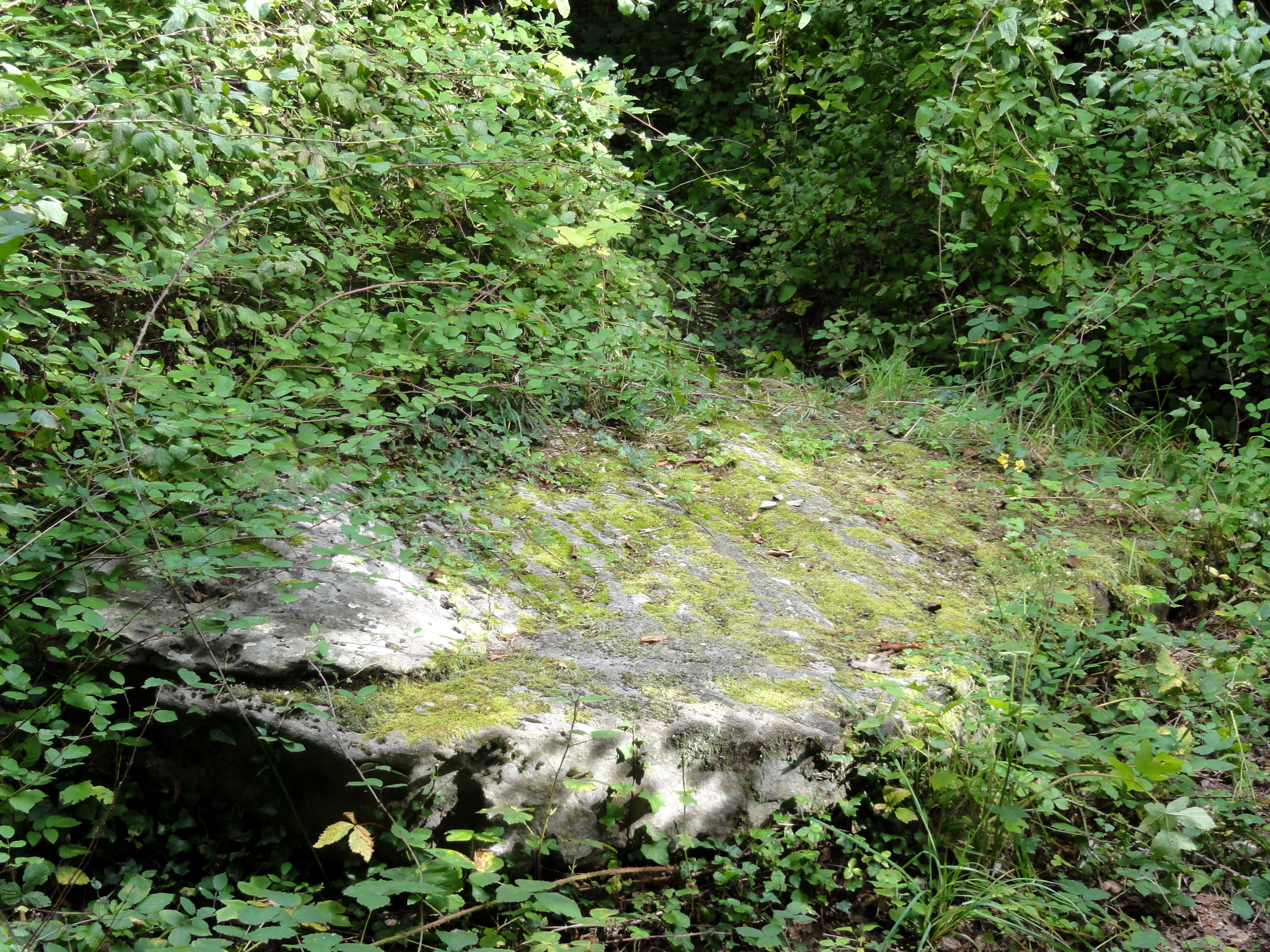 Menhir renversé dit Grande Pierre de Jouy.